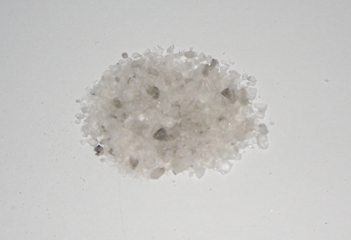 Forţă mecanică (aprox.): 16,2 kgf/cm2